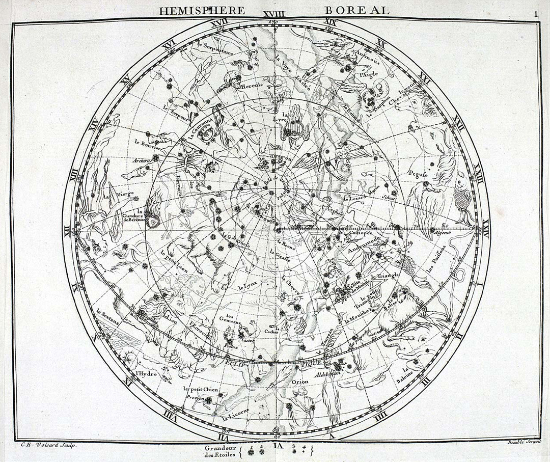 Atlas Coelestis